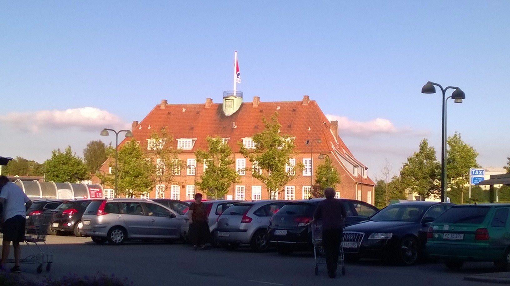 Udsigt fra Kvickly i Næstved mod Spar Nord.